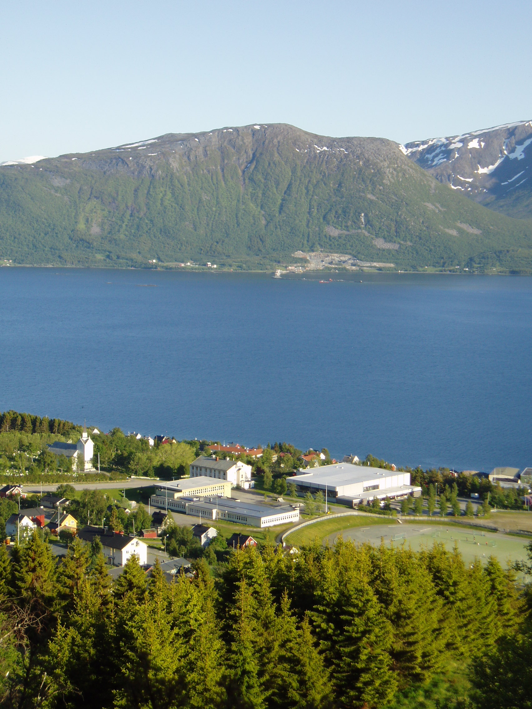 Kvæfjord kirke. Borkenes skole. Kvæfjordhallen. Borkenes stadion. Salfjellet, Kveøyforbindelsen under konstruksjon.